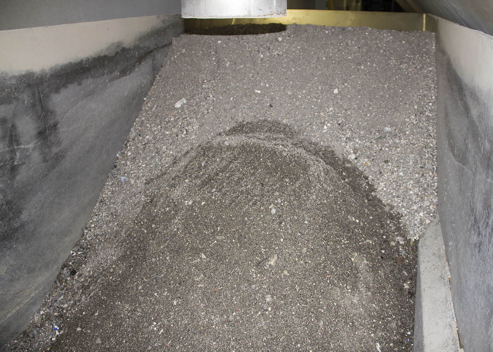 Sand und feiner Kies in der Sandwaschanlage der ARA Worblental in Worblaufen